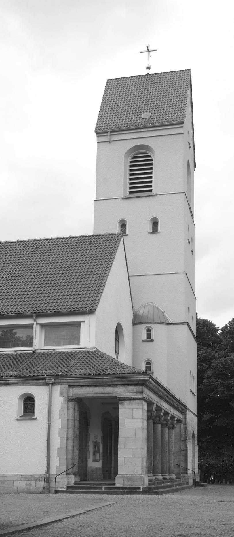 Eigene Photographie